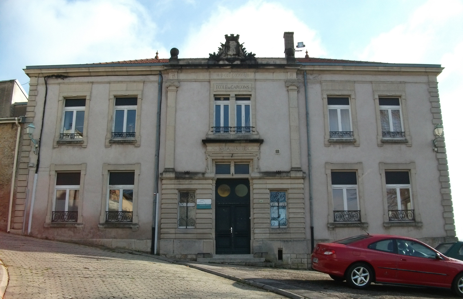 Liverdun,_l'ancienne_mairie_et_l'ancienne école, construction 1887, les armes de la ville sont au sommet de l'édifice.